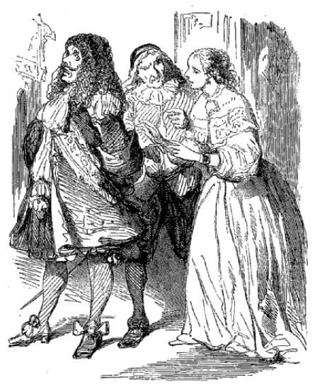 Illustration de la pièce de Molière, Monsieur de Pourceaugnac. Monsieur de Pourceaugnac, Julie et Oronte, le père de Julie, acte II, scène VI.